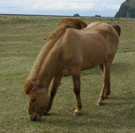 Vestmannaeyjar, Iceland